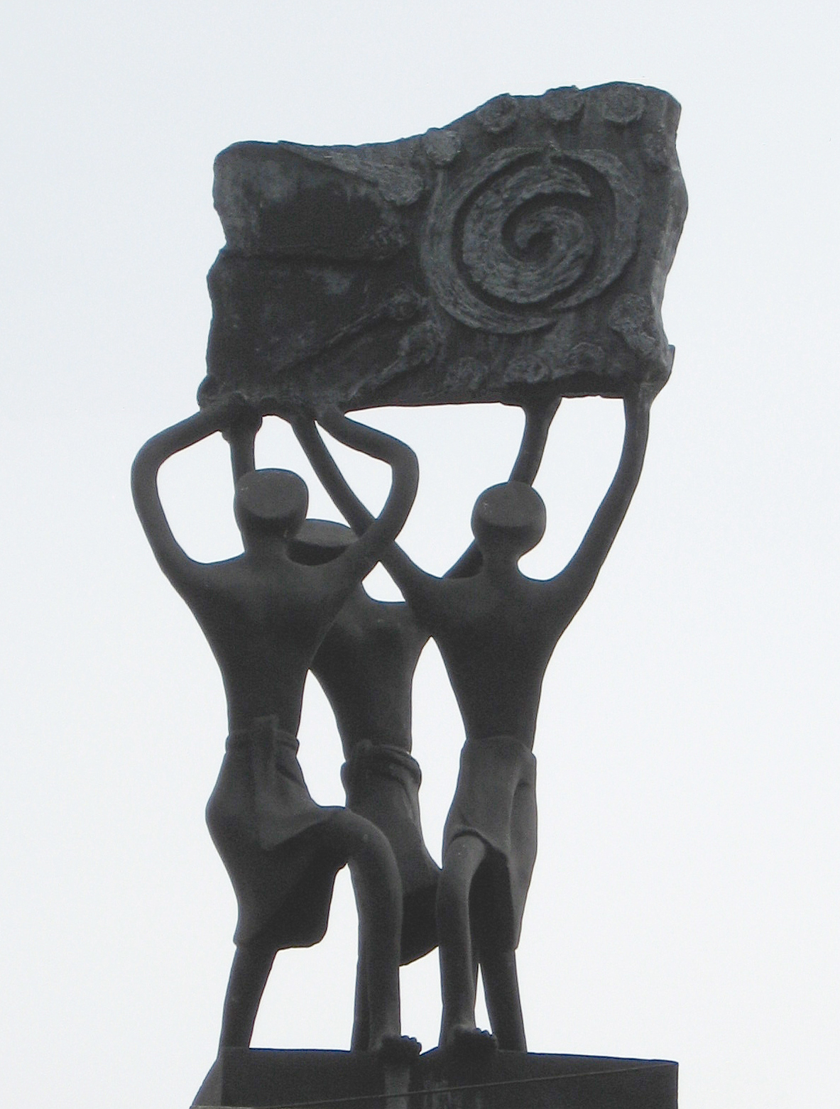 വൈക്കത്തെ സത്യാഗ്രഹ സ്മാരകത്തിനു മുൻപിലെ പ്രതിമ